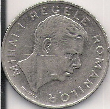 Аверс монеты номиналом 100 румынских леев образца 1944 года. На круге надпись "Михай I - король Румынии"